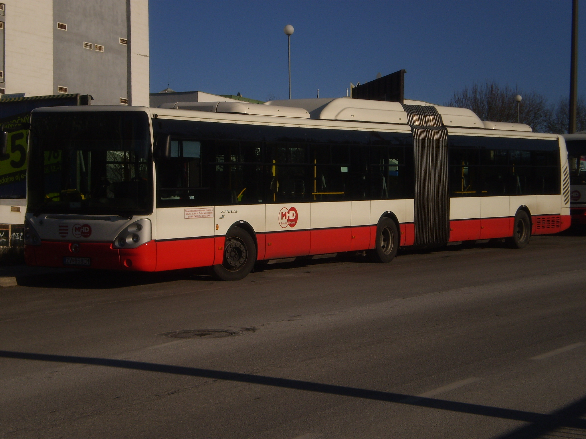 Citelis 18M BB